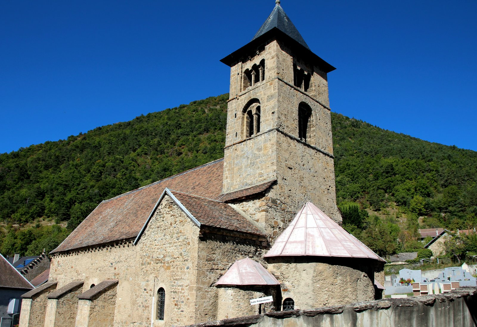 Église romane homogène